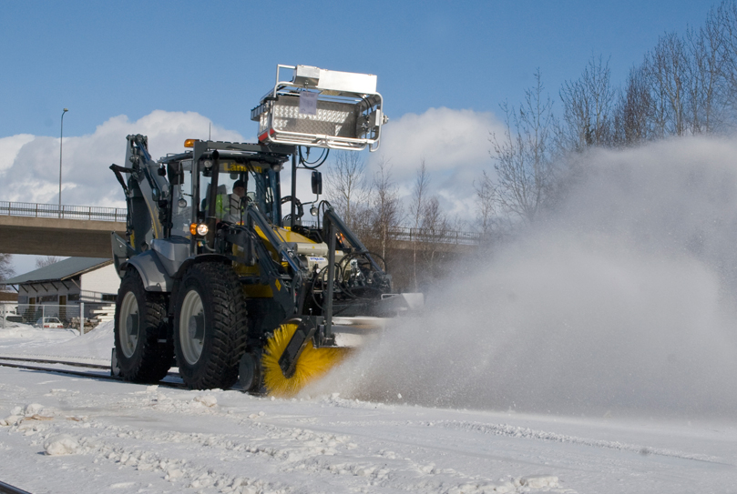 Lännen ratatöihin erikoisvarusteltu pyörakuormainkaivuri